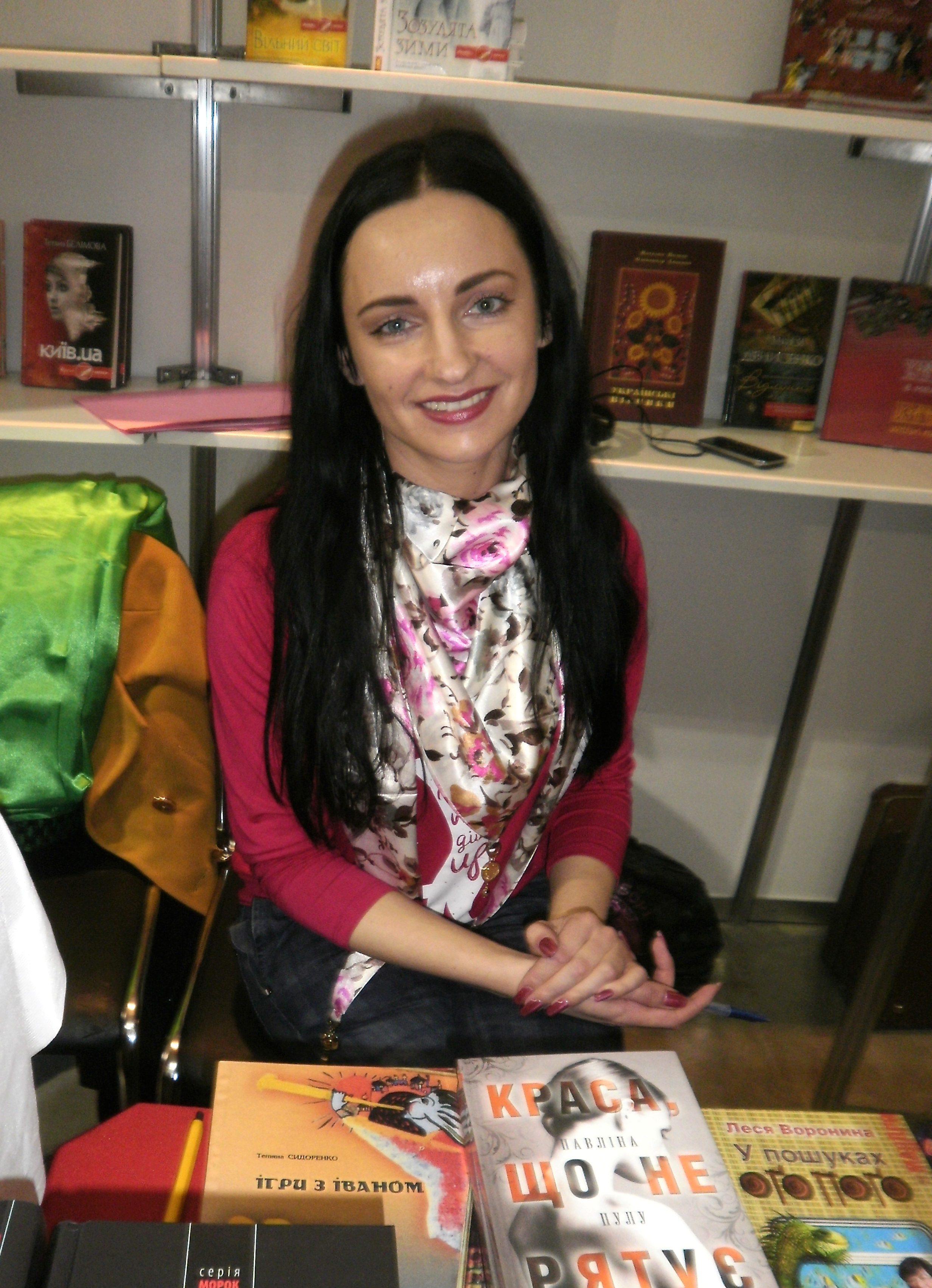 фото української письменниці Вікторії Гранецької